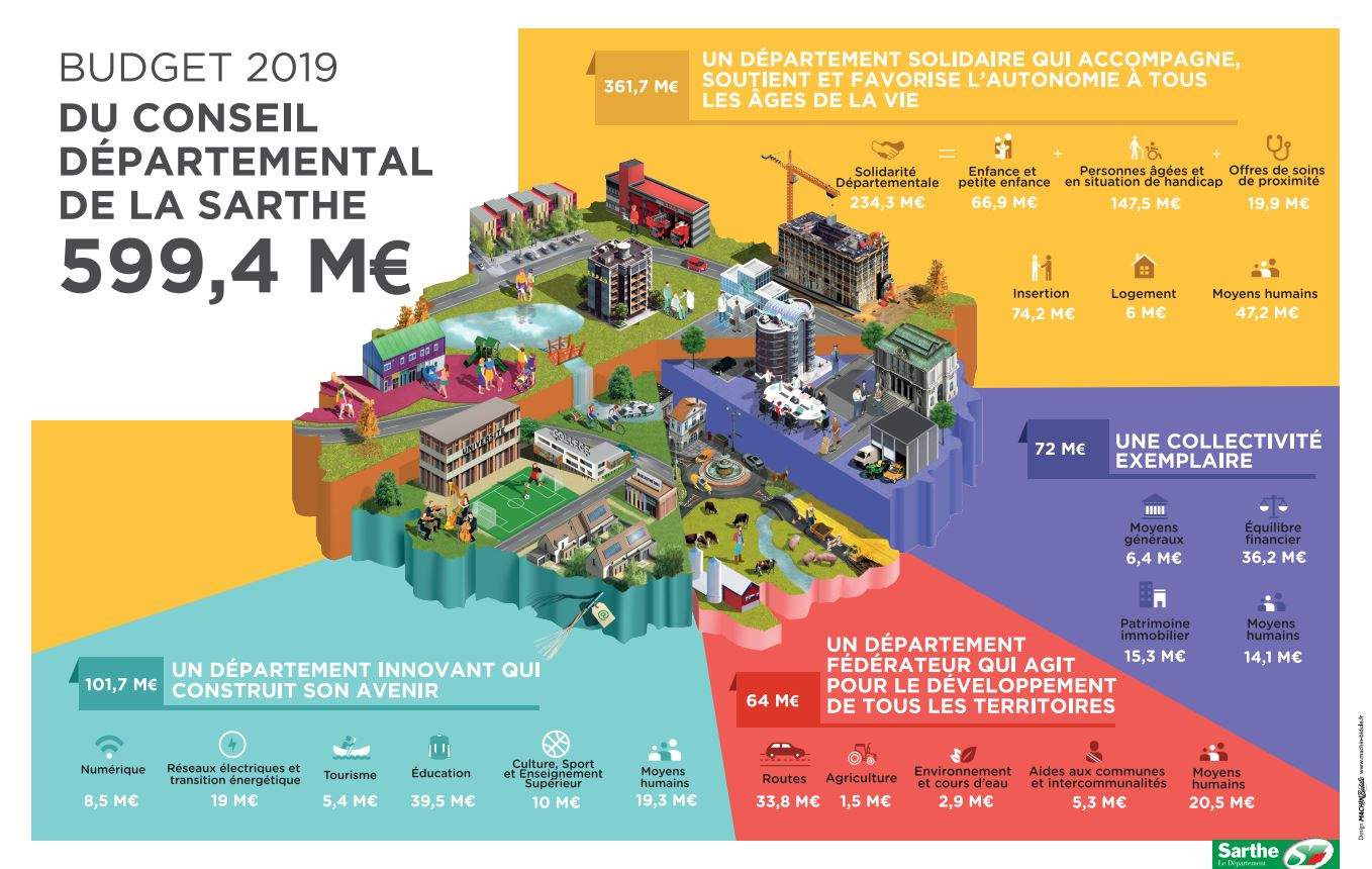 Infographie du budget du CD72 2019